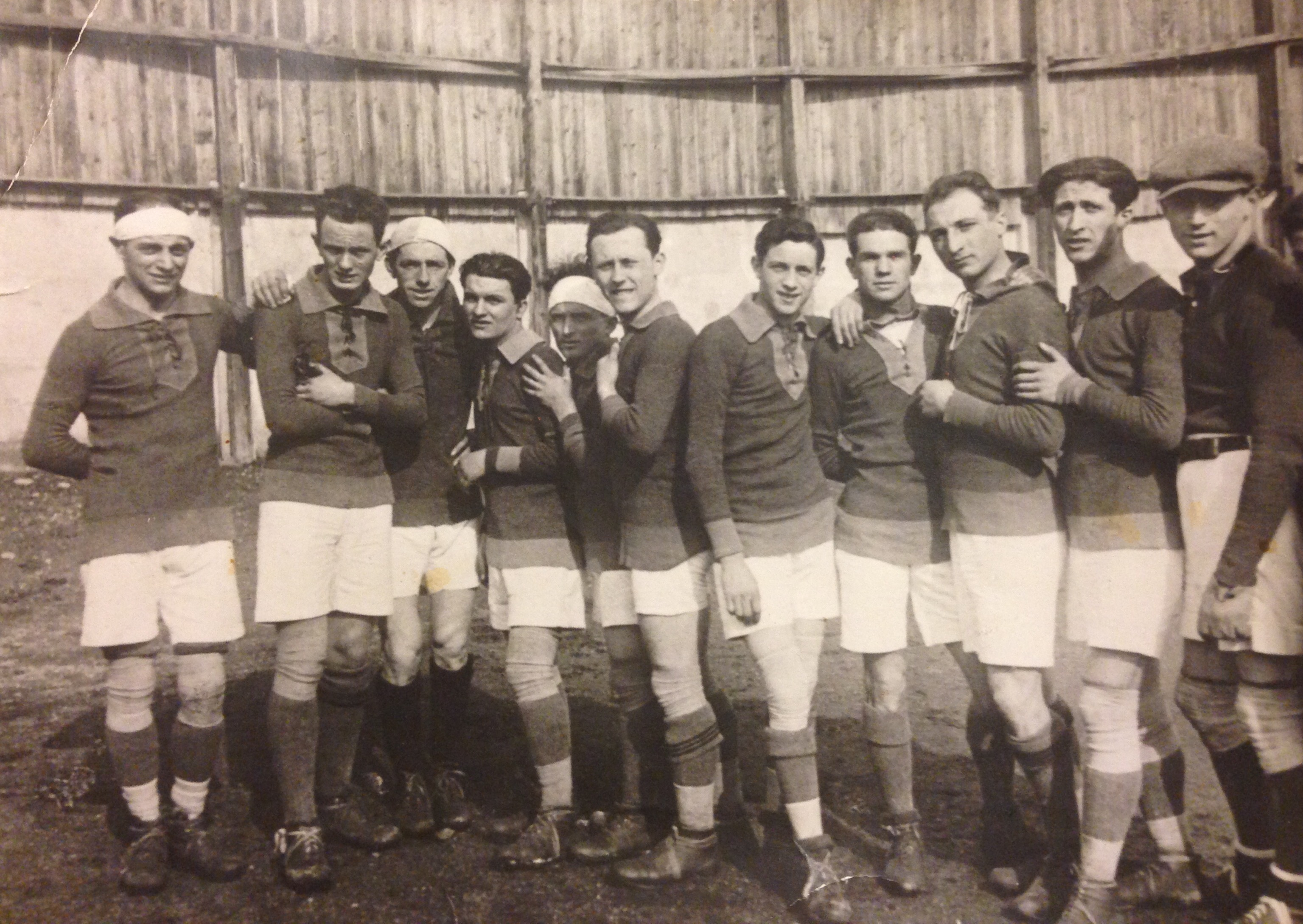 Una formazione della US Cremonese nei primi anni 20 del XX secolo; da sinistra: Papadia, Cogrossi, Rossi, Leo Ardigò, Antonioli, Antognini, Bertazzoli, Cominacini, Poli, Corradi, Reccani.